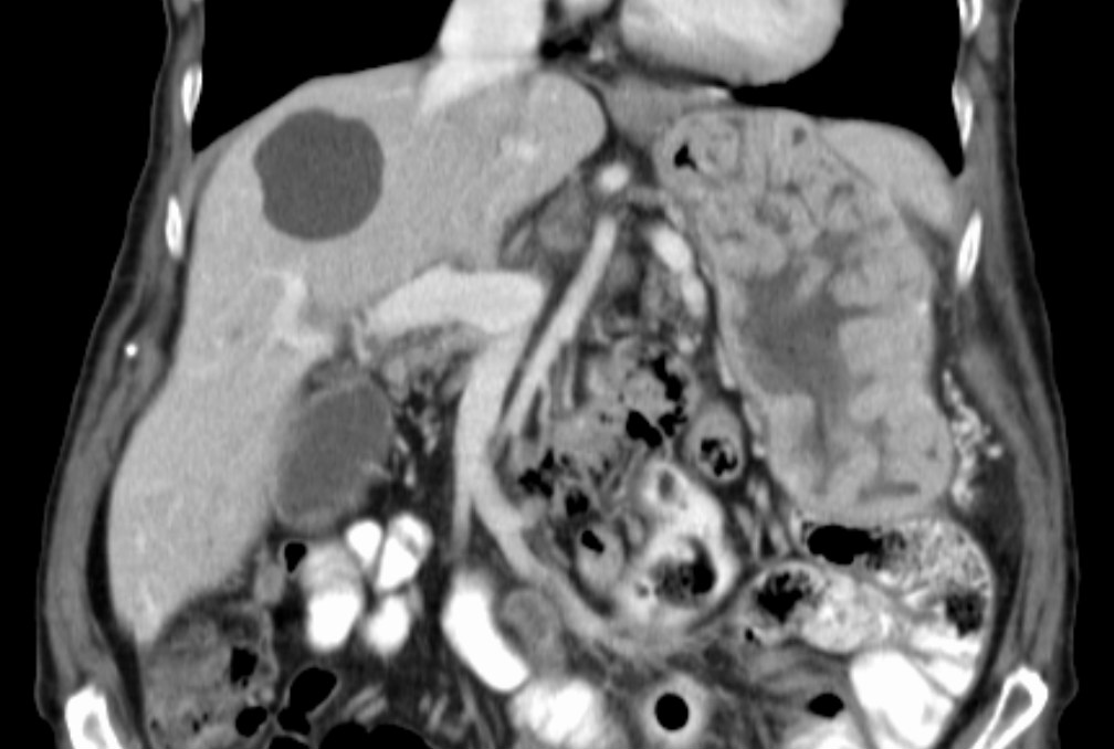 Riesenfaltengastritis in der Computertomographie coronar rekonstruiert. Mit abgebildete Leberzysten.